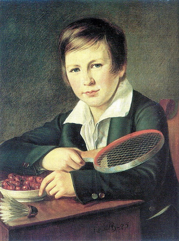 Николай Алексеевич Томилов (1814-1858) в детстве, с ракеткой для игры в волан, сын А.Р.Томилова и В.А.Мельгуновой.